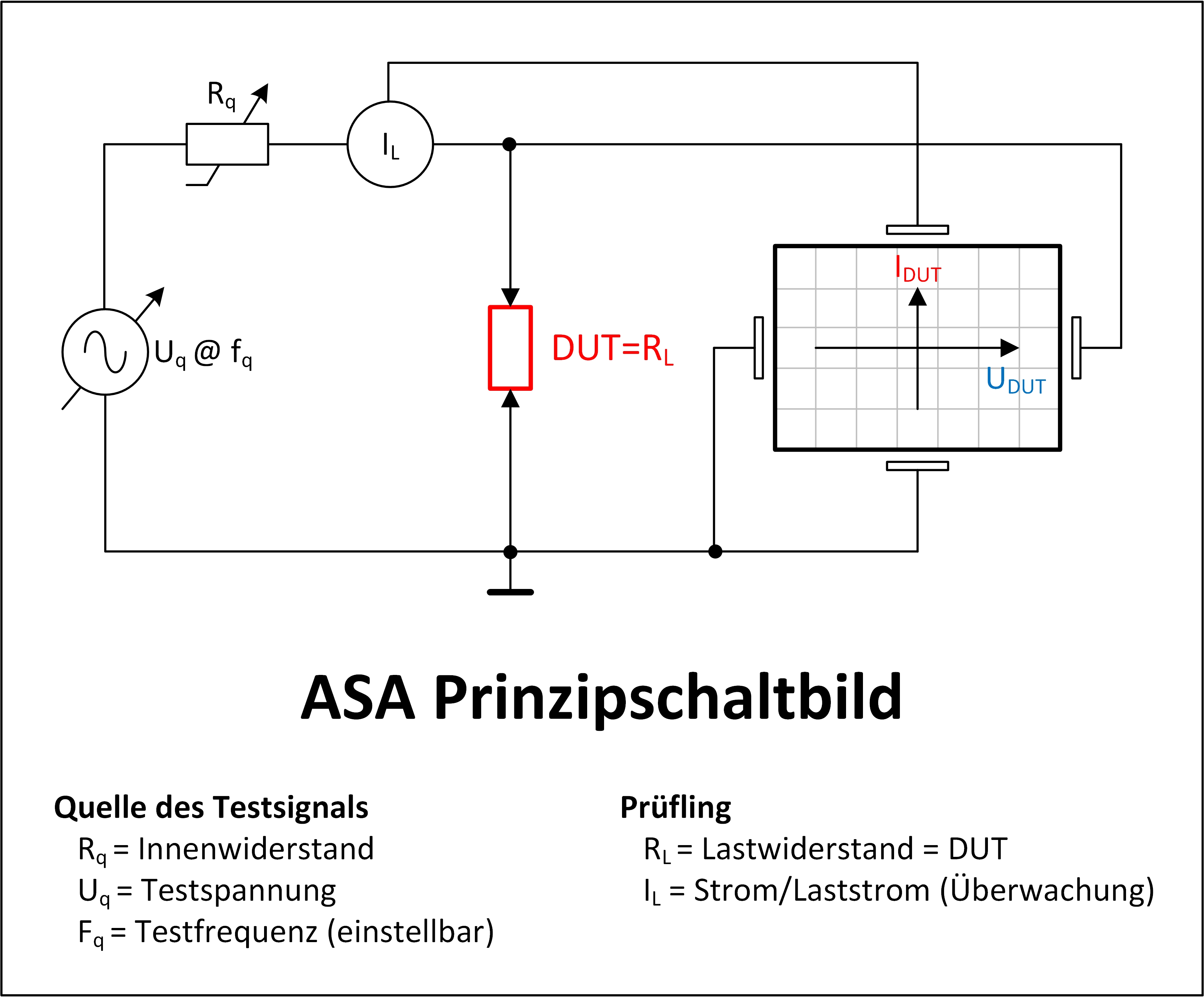 Elektrisches Schaltbild zur prinziphaften Darstellung des ASA Messverfahrens (Analoge Signaturanalyse).